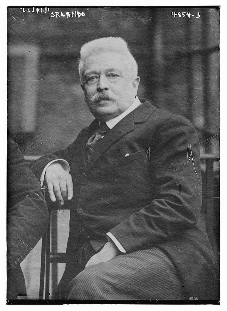 El político y primer ministro italiano Vittorio Emanulle Orlando, hacia 1919.